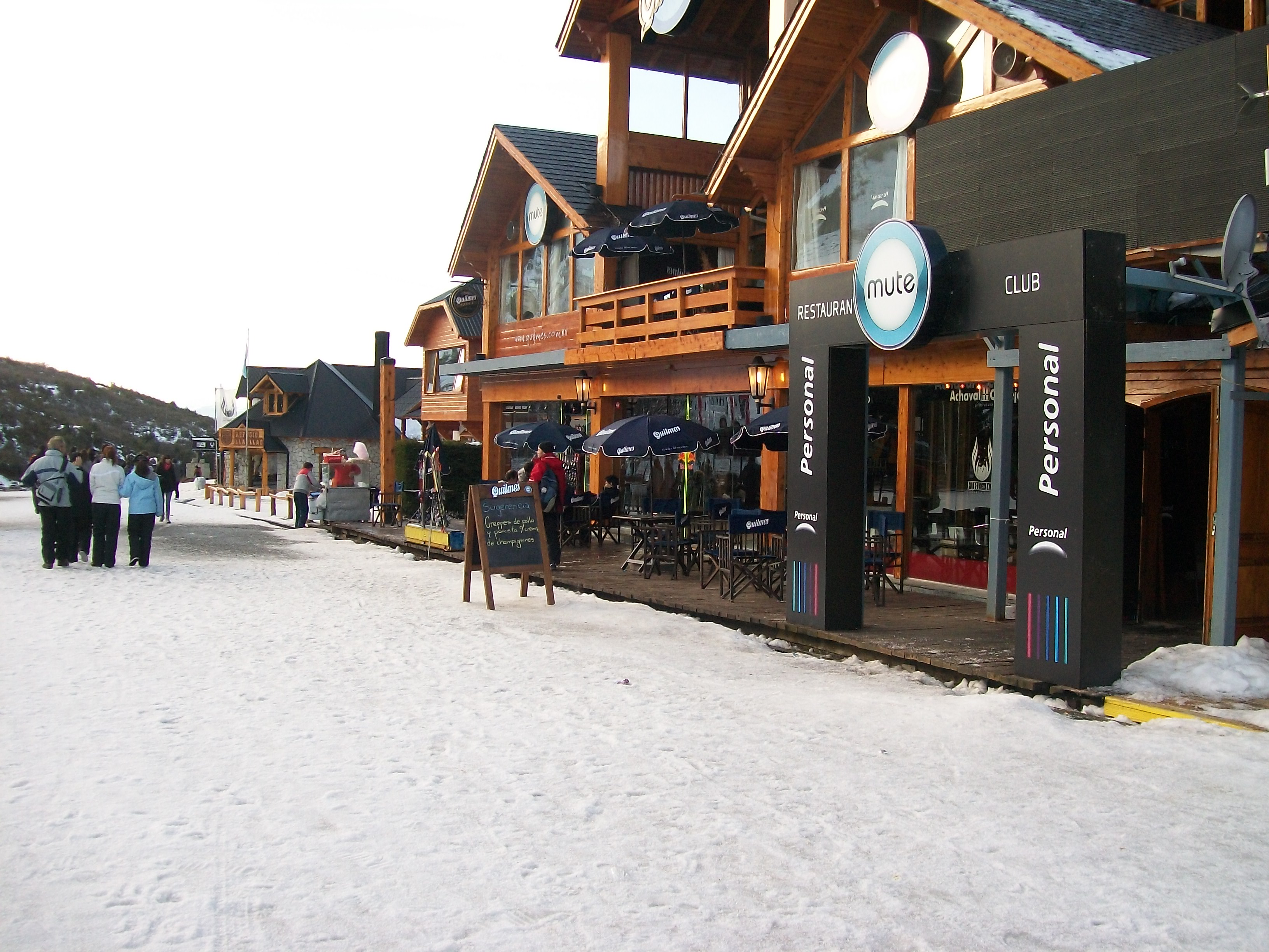 Base del Cerro Catedral en Bariloche. (Patagonia Argentina)